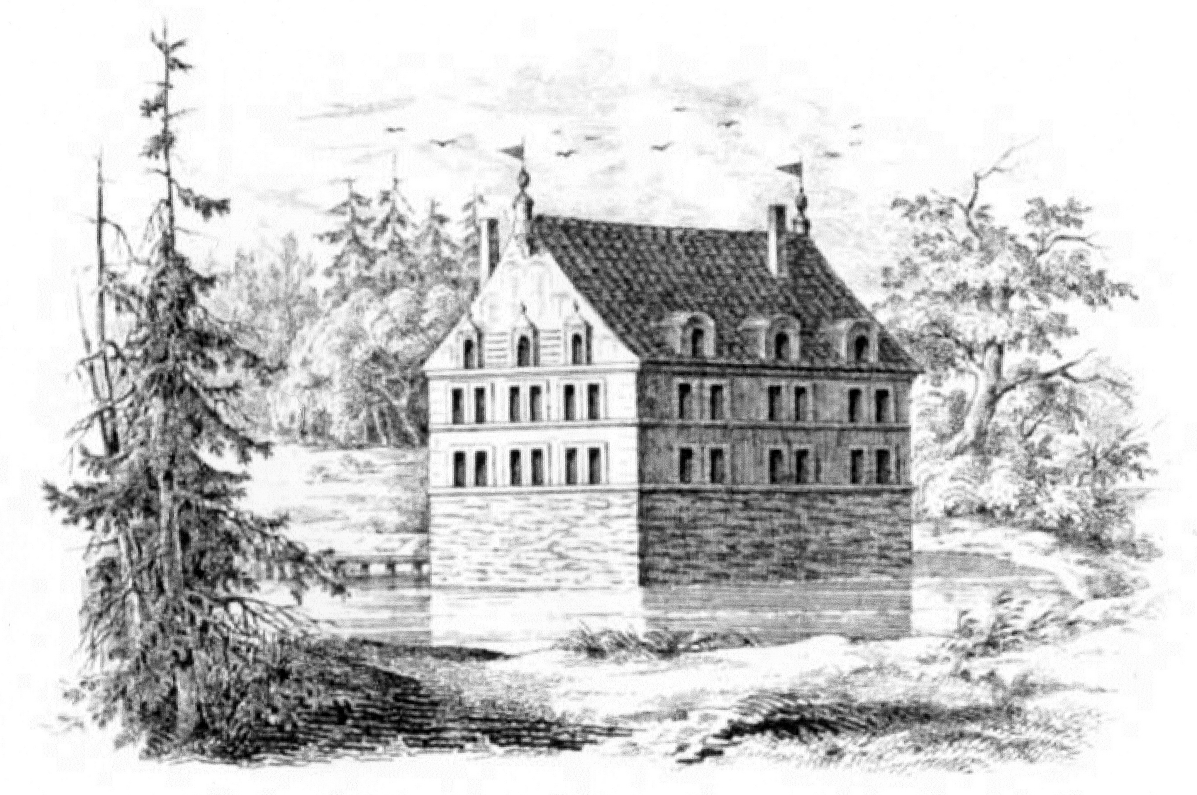 Das alte Wasserschloss Knoop, Zeichnung von Köhler und Roisternitz 1862